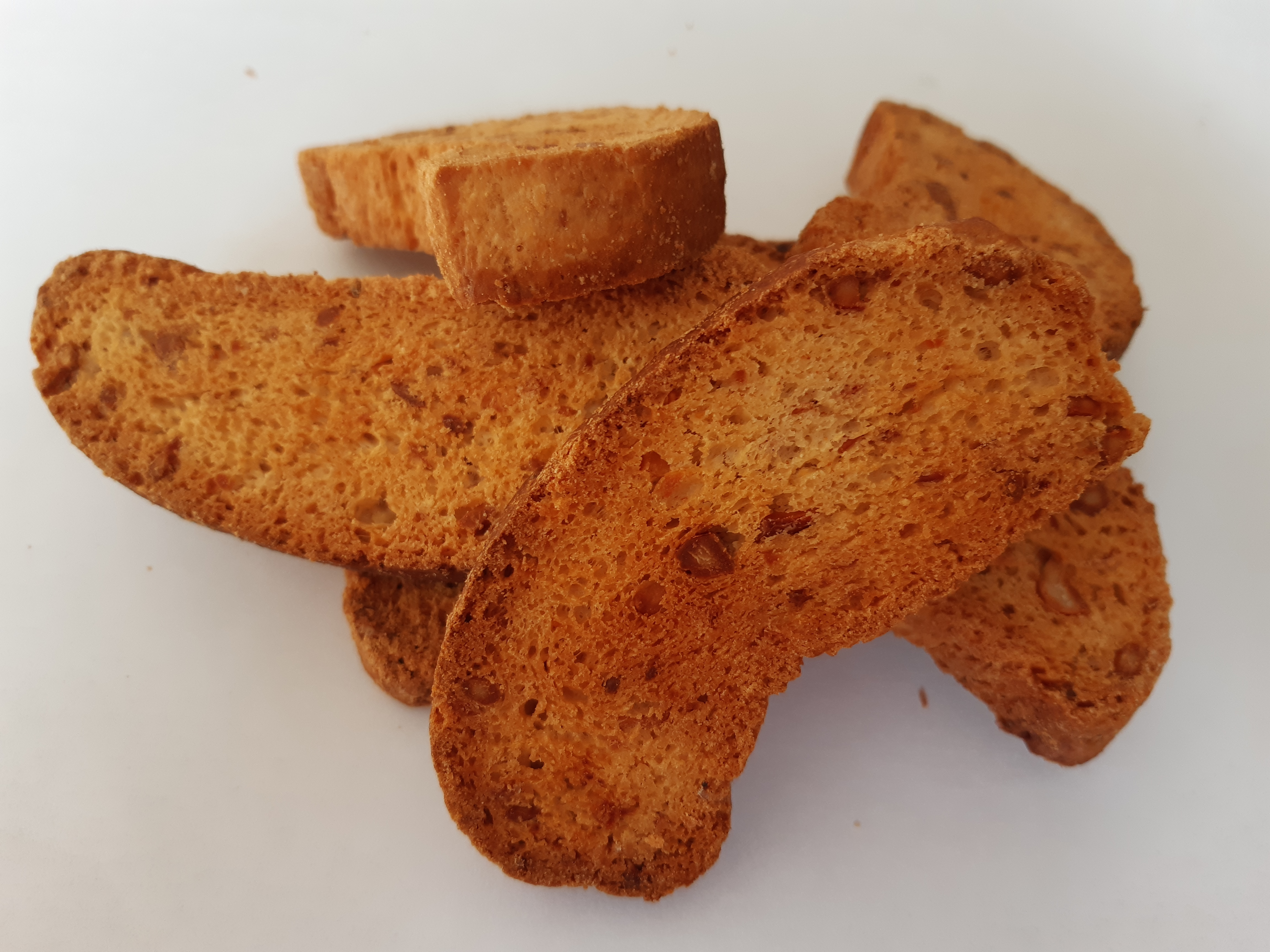 Сухари ореховые классические производства Тульского хлебокомбината. Произведёны 19 сентября 2019 года.